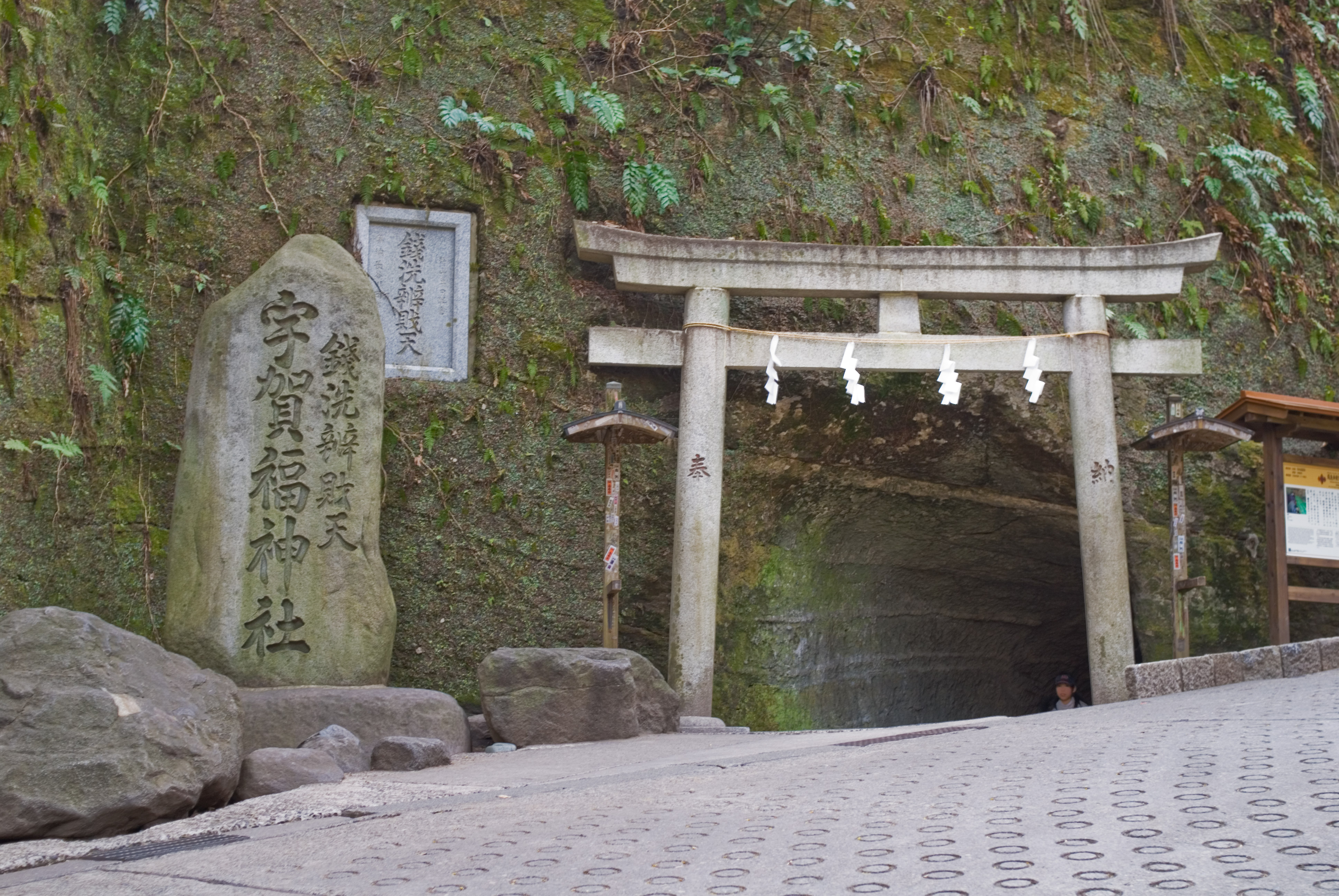 Zeniarai Benzaiten Jinja, Kamakura - The Entrance